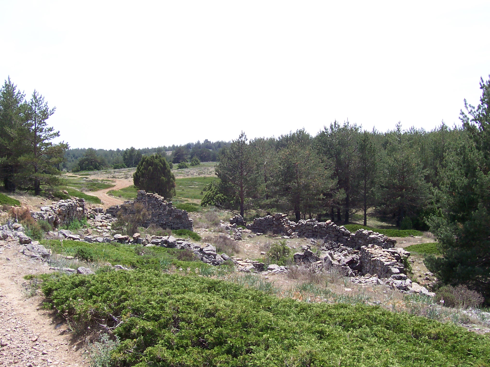 Ruinas del corral de Montesinos, descansadero próximo a la cañada real de Valencia a Aragón